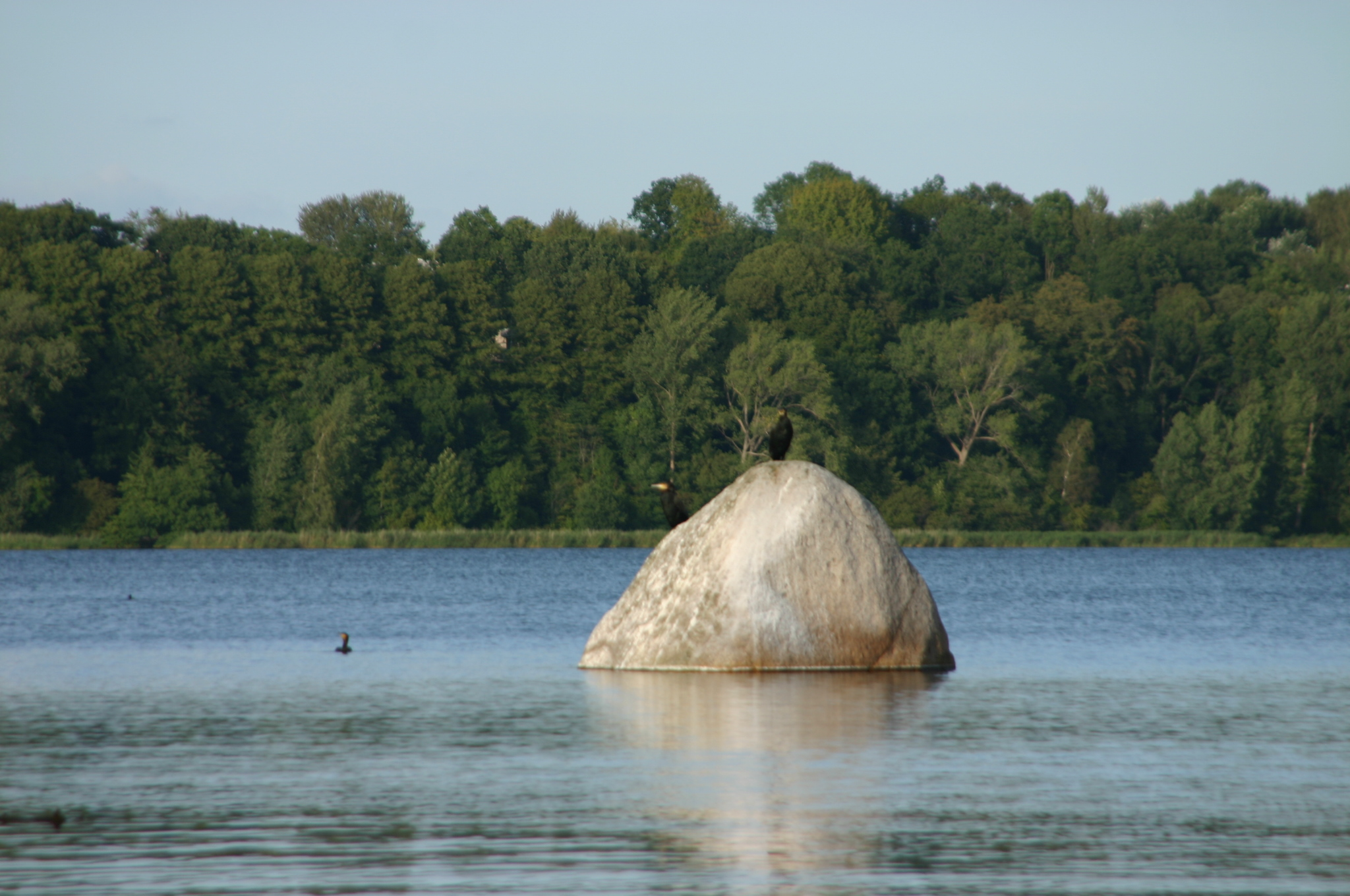 Weißer Stein im Windebyer Noor mit rastenden Seevögeln